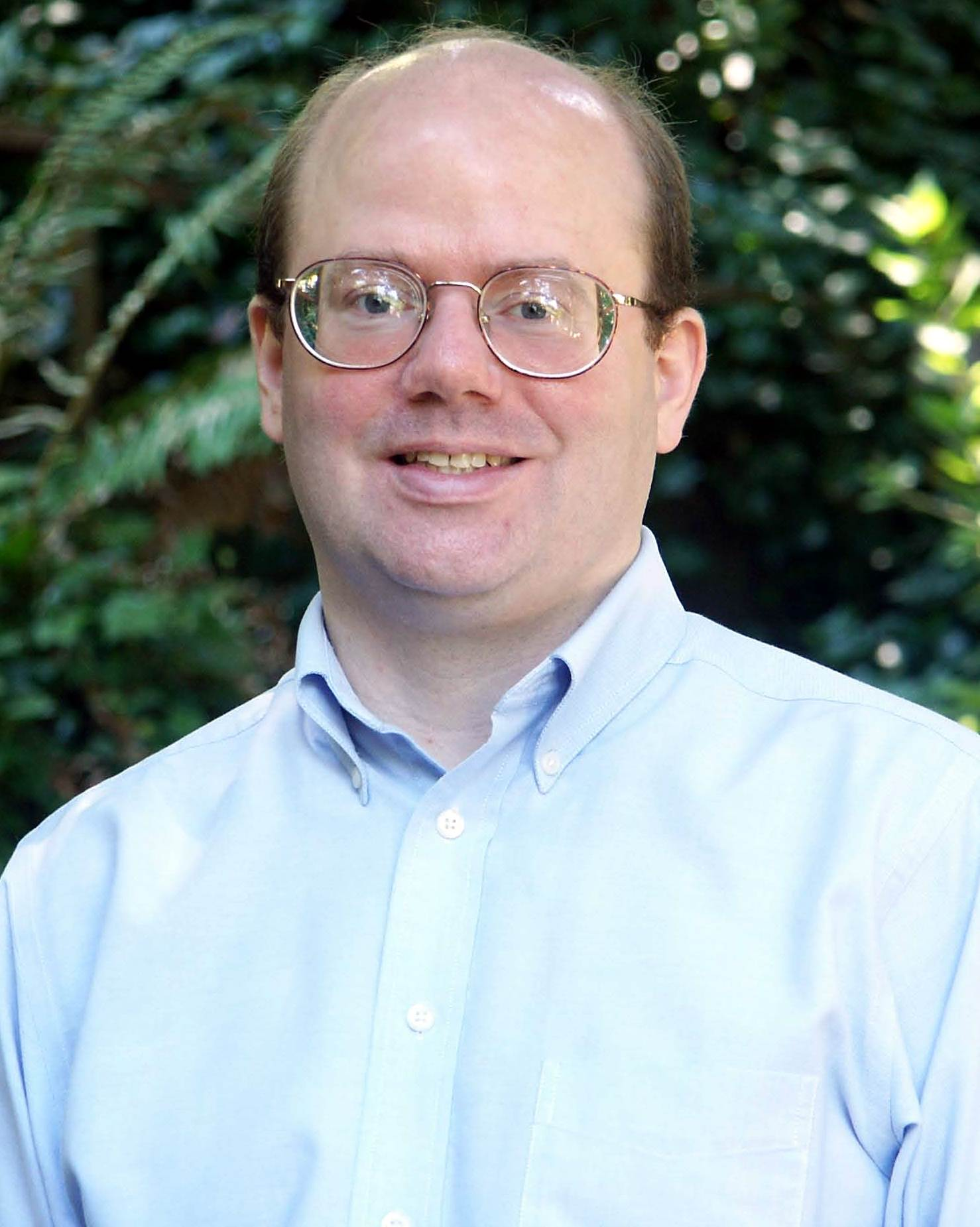 Larry Sanger.